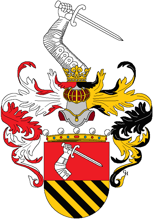 Wappen des k.u.k. Generaloberstern und letzten Kriegsministers von Österreich-Ungarn, Rudolf Freiherr Stöger-Steiner von Steinstätten (186–1921), verliehen anlässlich seiner Erhebung in den österreichischen Freiherrenstand 1918. Zeichnung von Gerd Hruška ( Für weitere Informationen zu dieser Standeserhebung siehe (